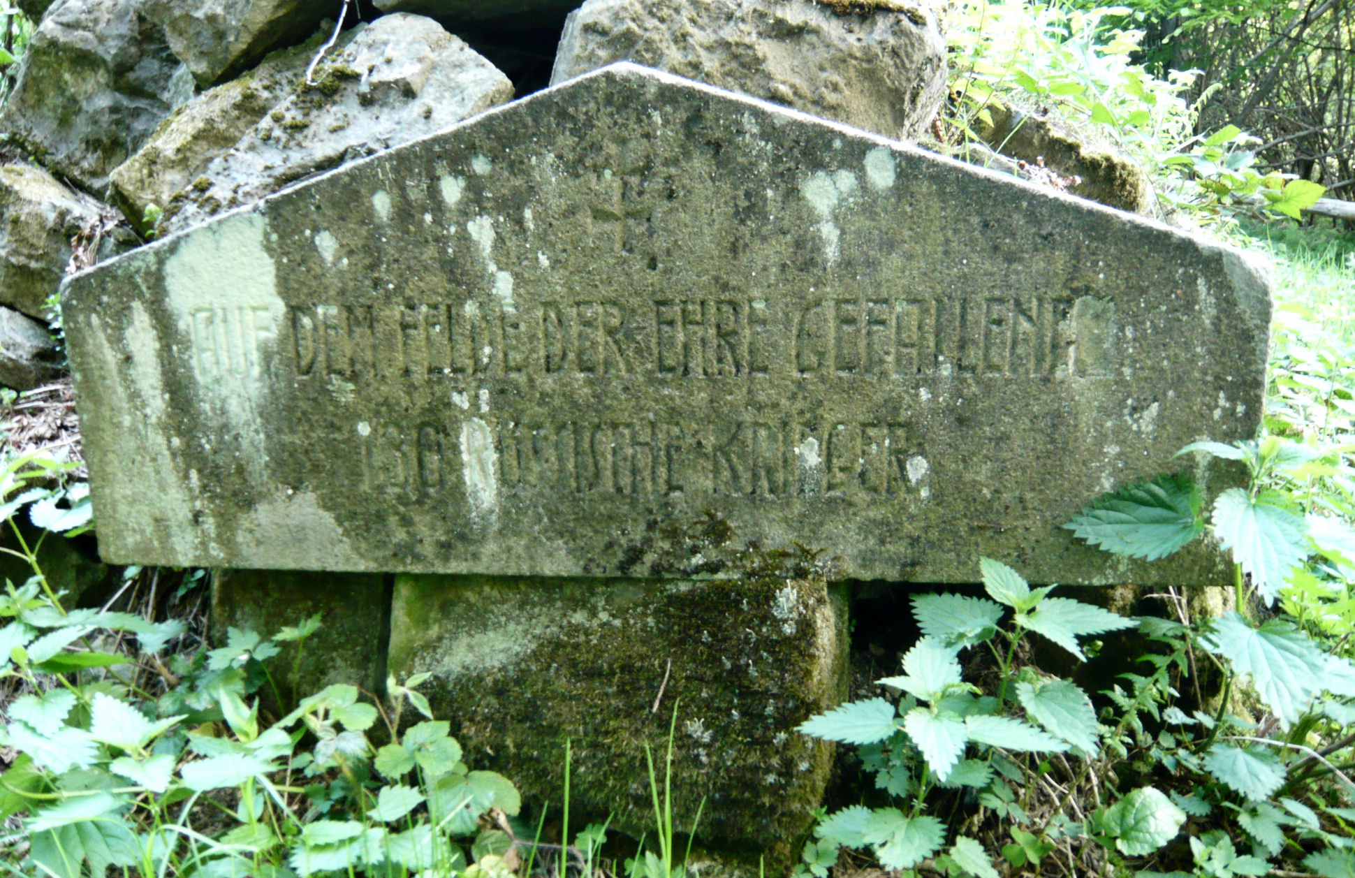 Cmentarz wojskowy nr 1 - Ożenna